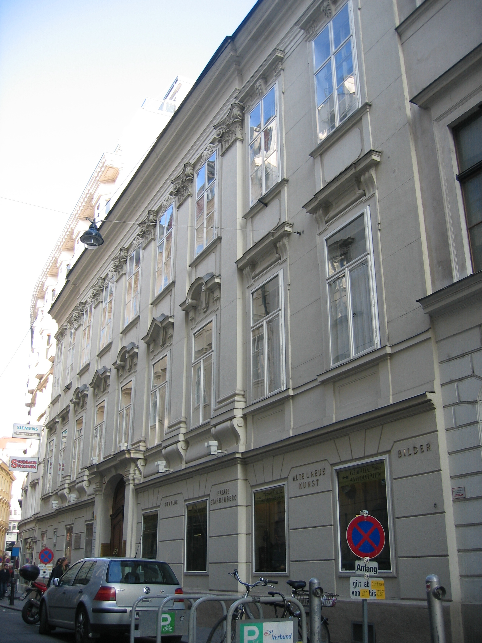 Das Palais Starhemberg an der Dorotheergasse in Wien